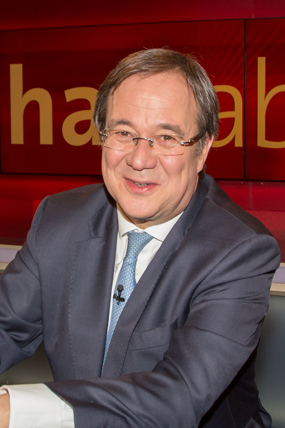 Armin Laschet in der WDR-Sendung "hart aber fair" am 15.2.2016